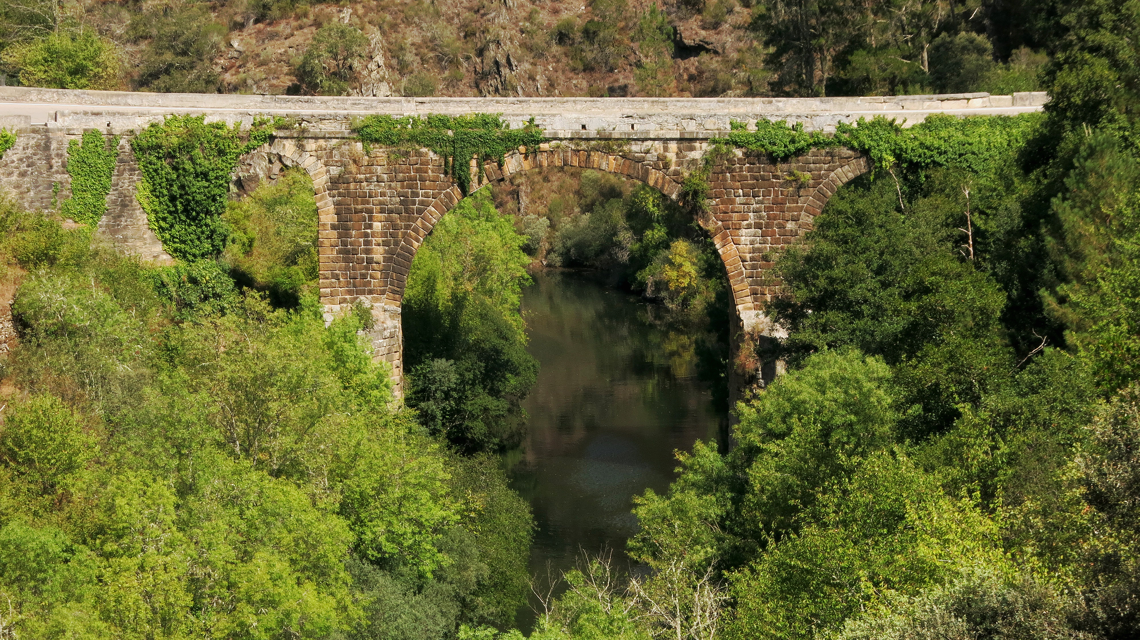 Vista frontal cara sur